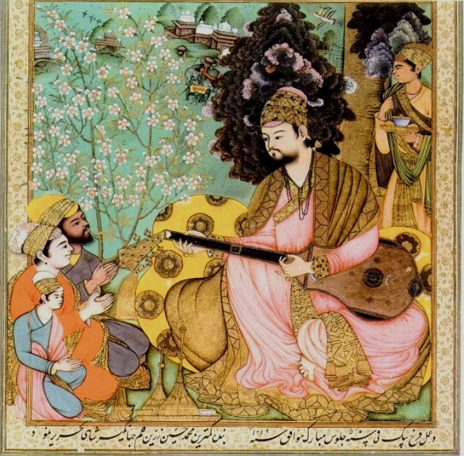 Фаррух Бек. Ибрагим Адилшах музицирует.1610-11